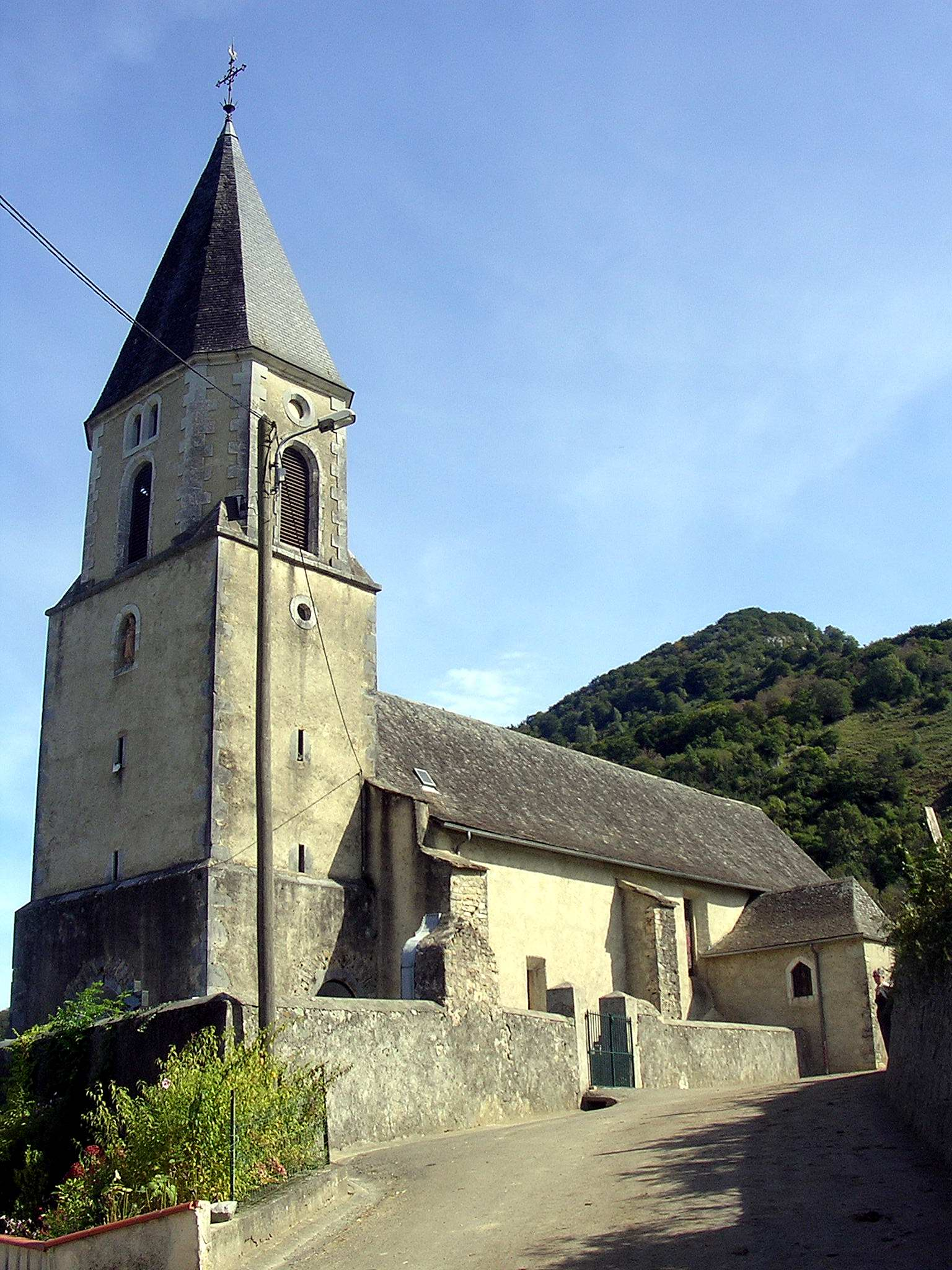 Lurbe-Saint-Christau, église paroissiale (département français des Pyrénées-Atlantiques)